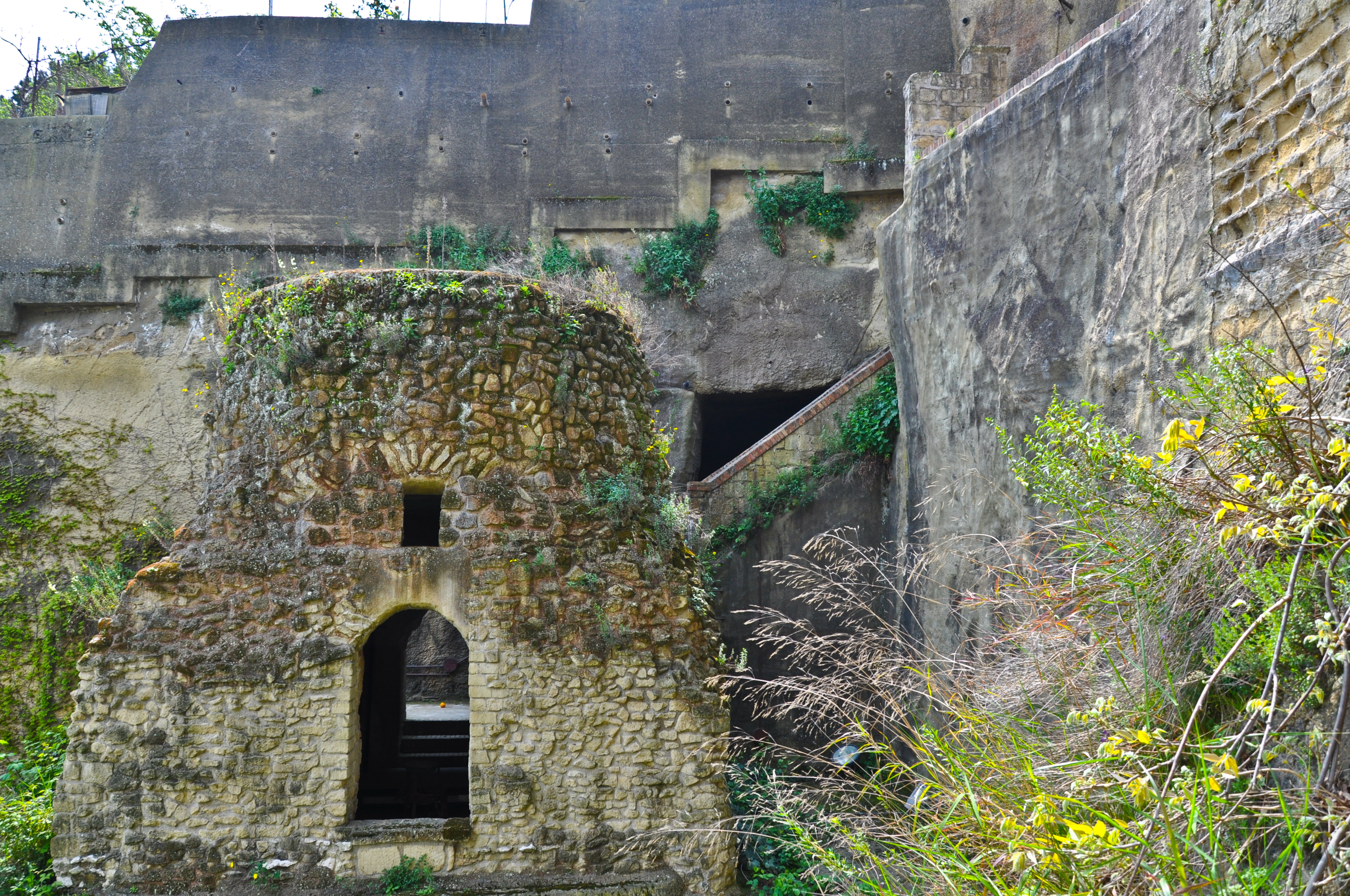 Sepolcro di Virgilio (Parco Vergiliano, Napoli)